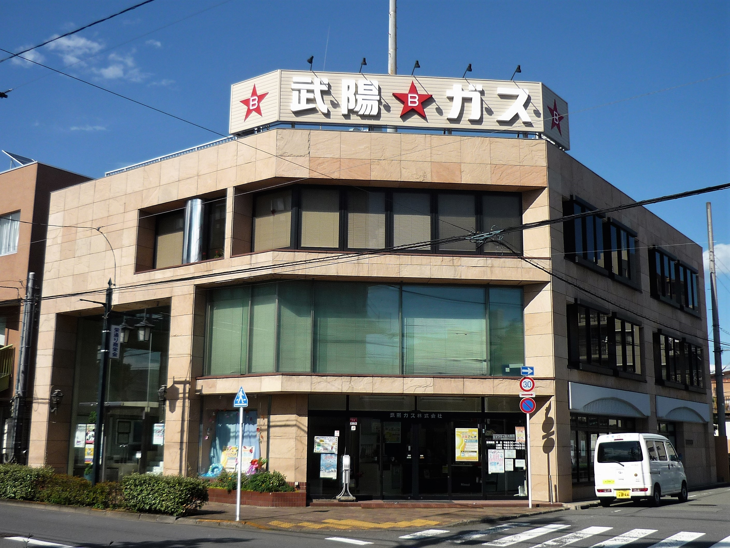 武陽ガス本社